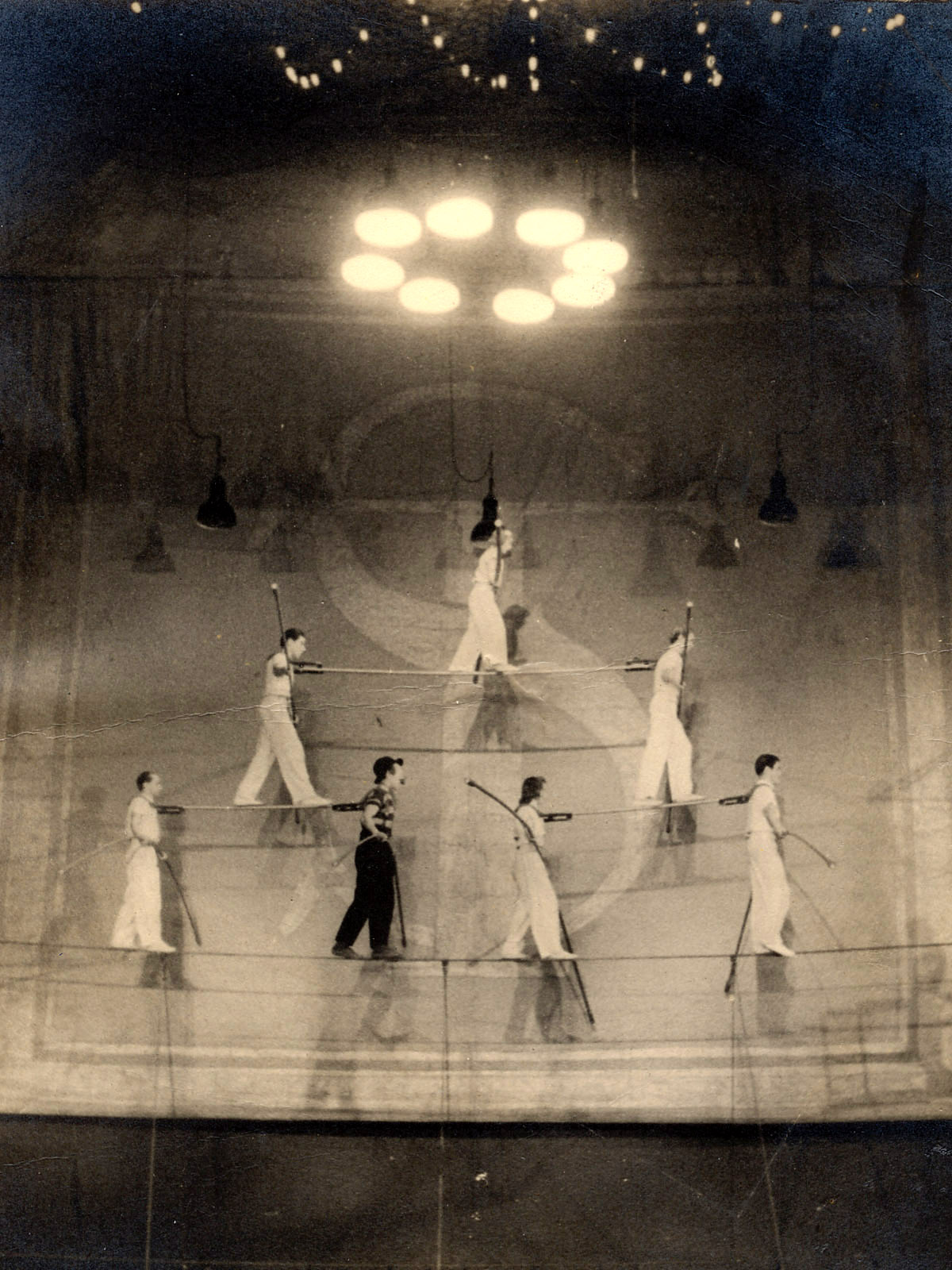 Bob Gerry Troupe im Circus Sarrasani in Dresden kurz vor dem Bombenhagel.